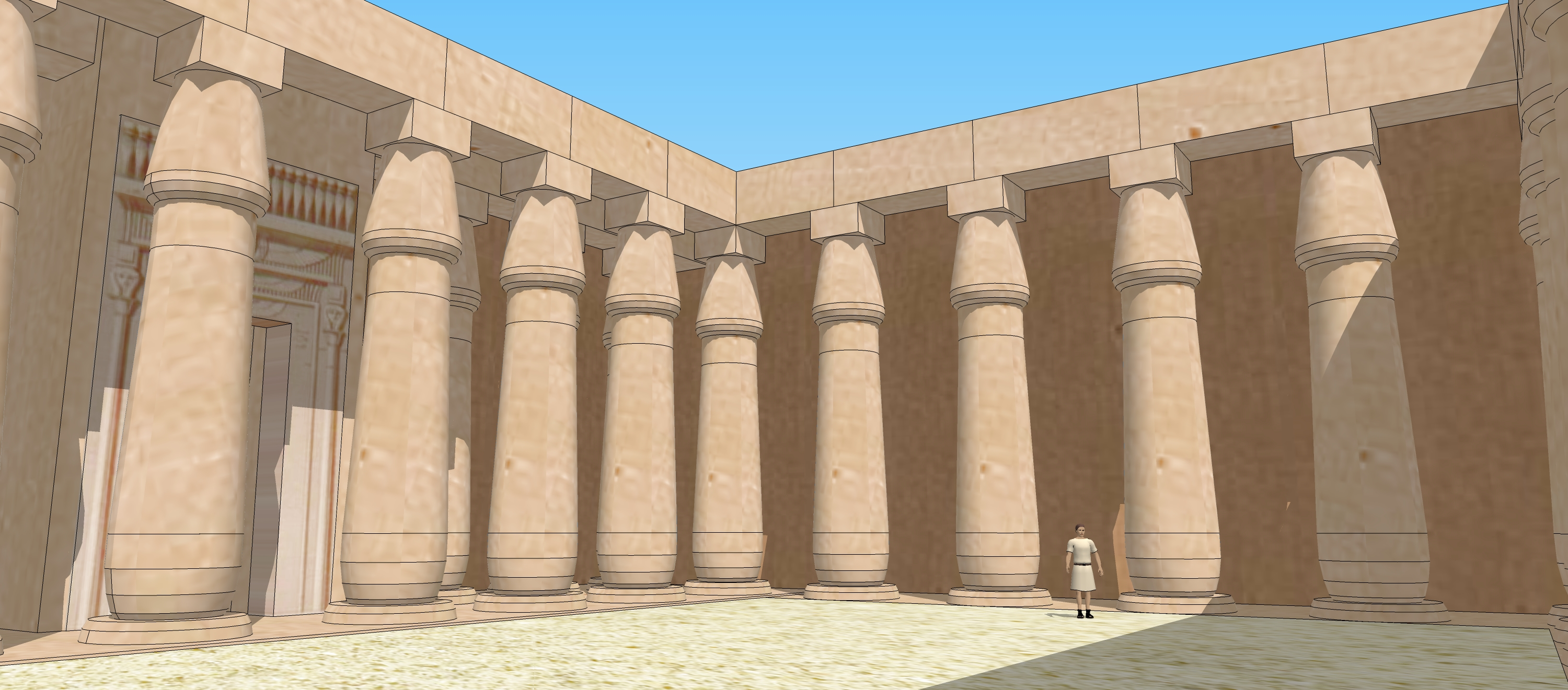 temple de Soleb cour